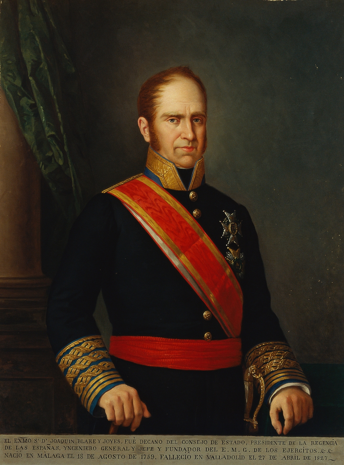 Retrato del militar español de ascendencia irlandesa Joaquin Blake y Joyes (1759-1827). Esta obra es una copia del retrato original conservado en la Dirección del Estado Mayor, y el retratado luce las grandes cruces y las bandas de la Orden de San Fernando y de la Orden de San Hermenegildo.